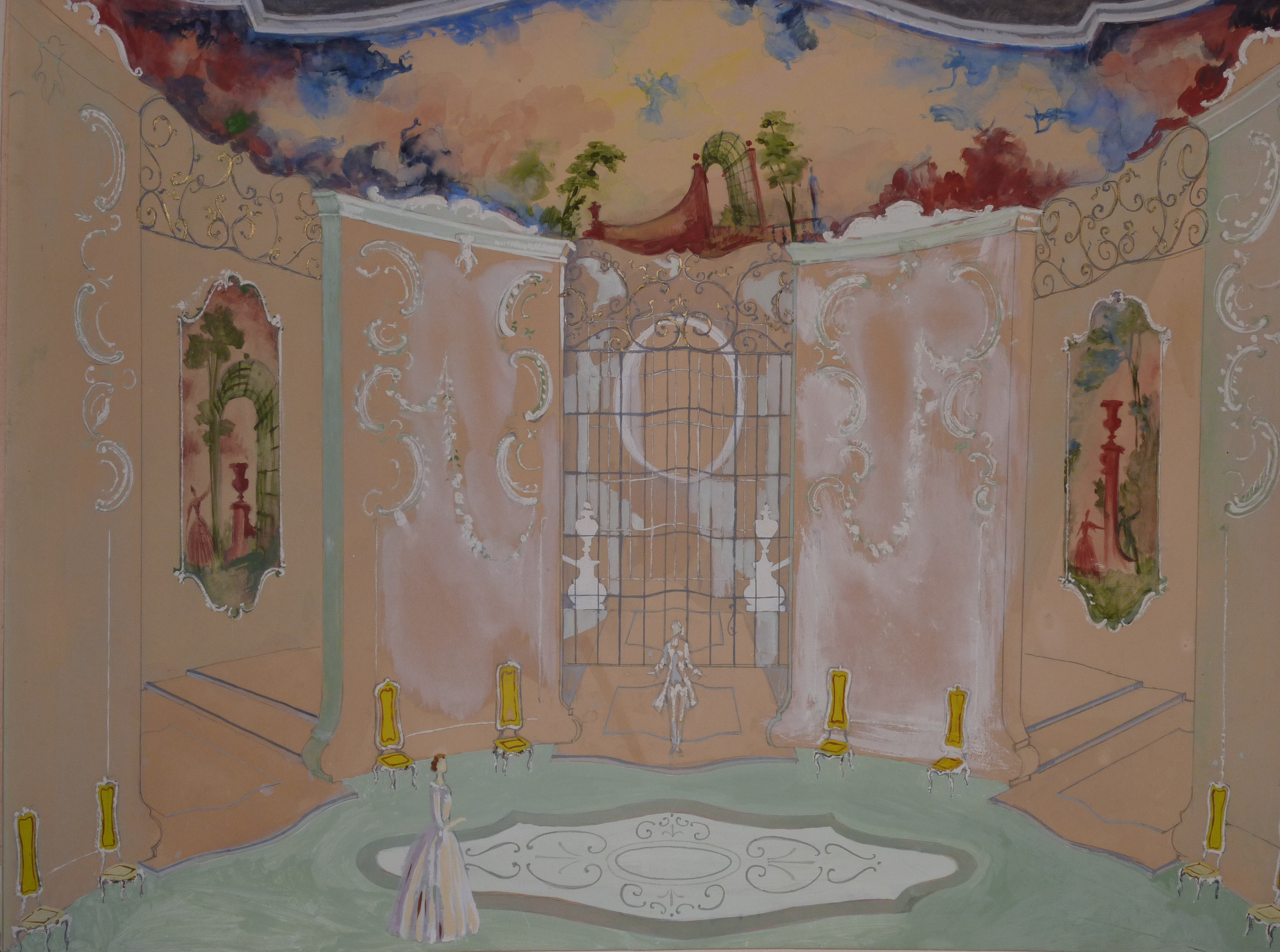 Bühnenbildentwurf von Helmut Jürgens für "Rosenkavalier" von R. Strauss, 2. Akt, Aufführung München 1962